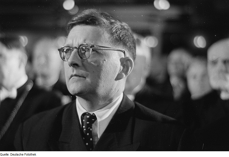 Original image description from the Deutsche Fotothek Portrait Dmitri Dmitrijewitsch Schostakowitchs im Publikum der Bachfeier